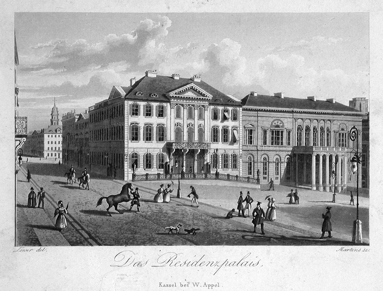 Aquatinta: „Ansicht des Residenzpalais, um 1840“, in: Historische Ortsansichten . In der Bildmitte das Weiße Palais, rechts das Rote Palais. In der Königssstraße hinter dem Weißen Palais das Palais Reichenbach (mit Flachgiebel), dann das Palais Hessen-Rotenburg